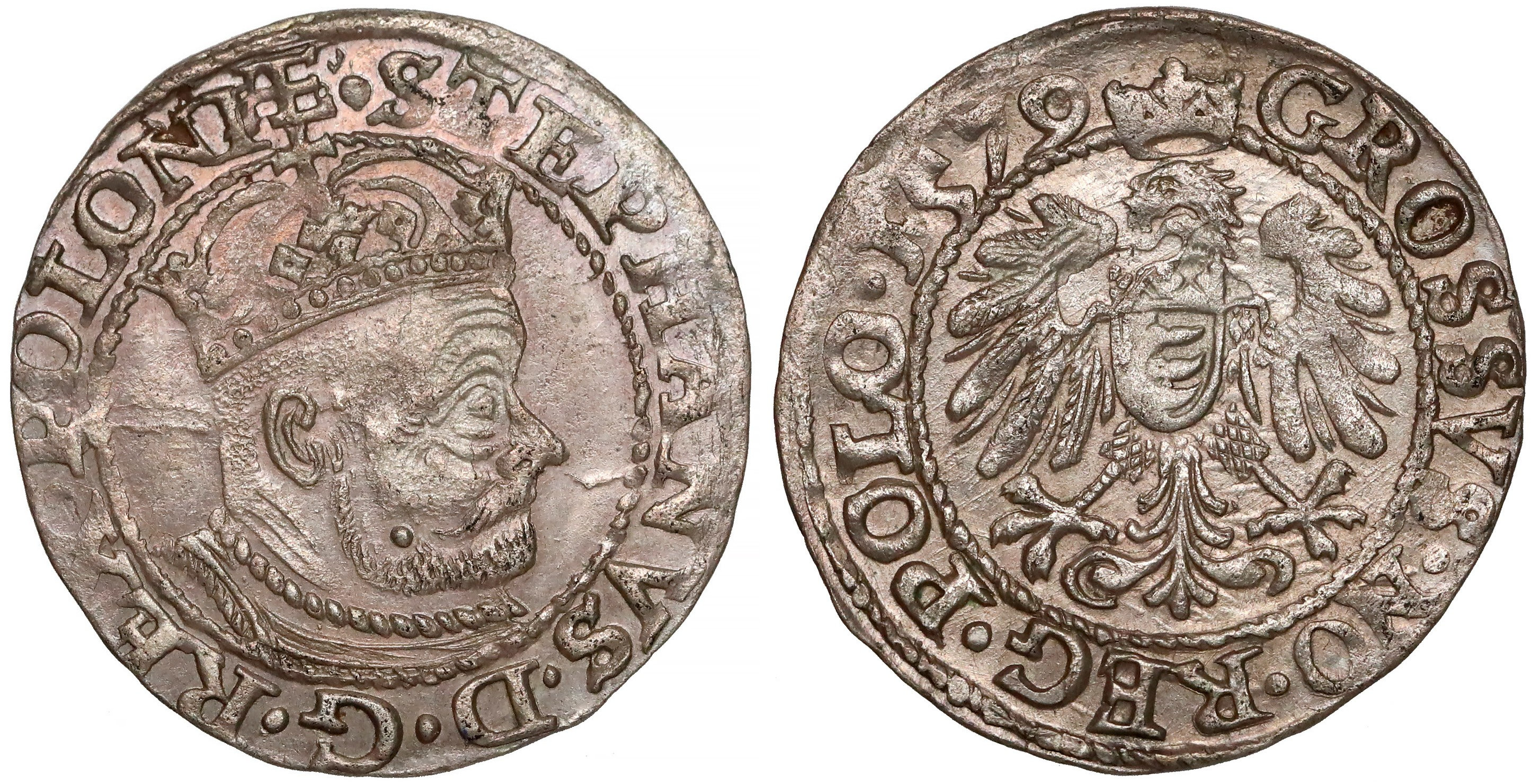 Grosz koronny 1579 Olkusz